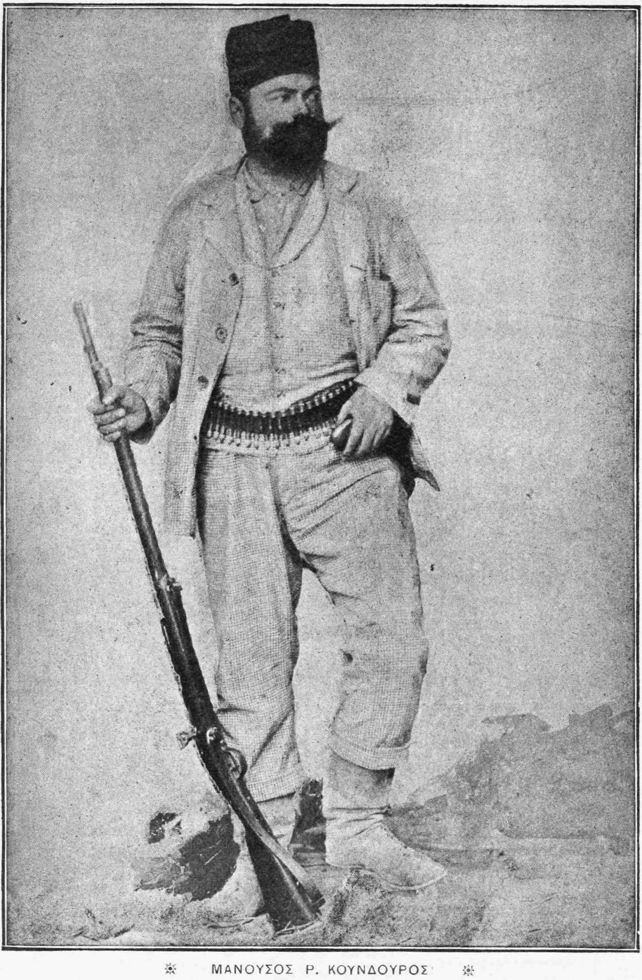 Manousos Koundouros, griechischer Freiheitskämpfer, 19. Jahrhundert